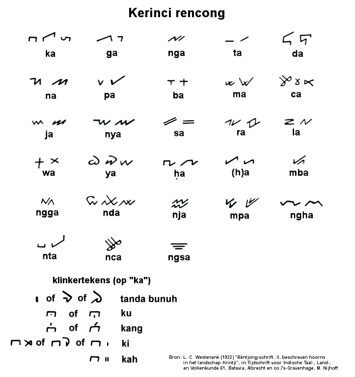 Het Kerinci recongschrift, bewerking van het schrift gepubliceerd door Westenenk (1922)